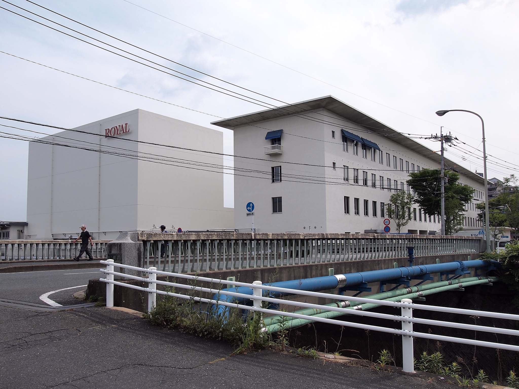 ロイヤルホールディングスの本社およびセントラルキッチンがあるロイヤルセンターを諸岡川対岸から望む。